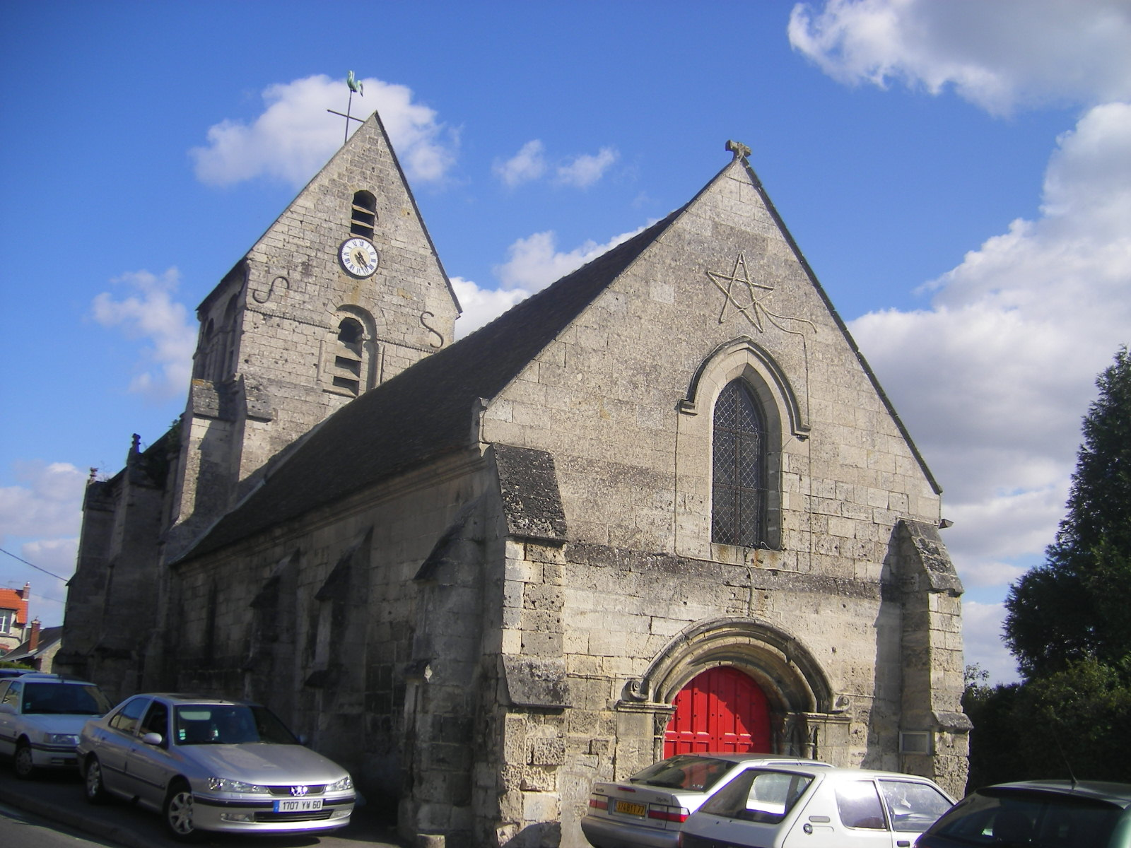 Église Saint-Martin de Pommiers .